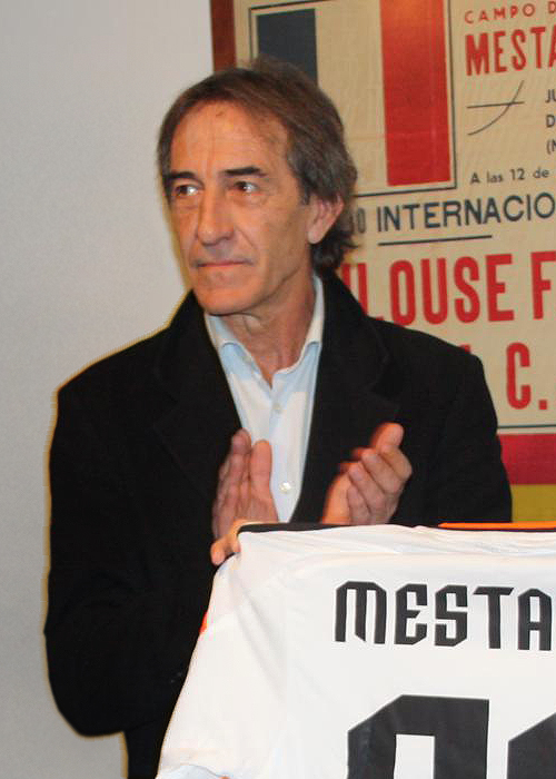 Ricardo Arias a Torrent